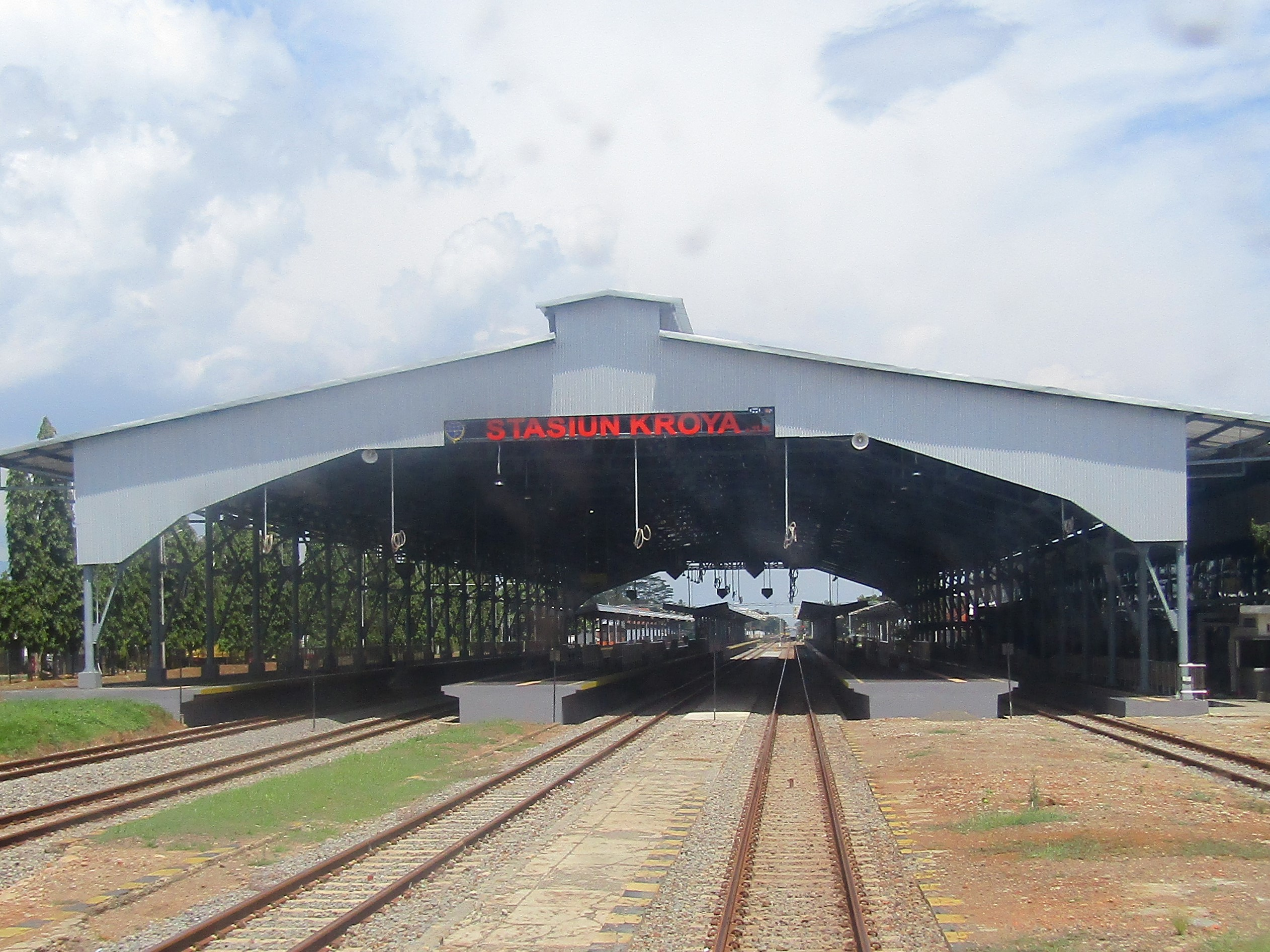 Emplasemen Stasiun Kroya, 2020